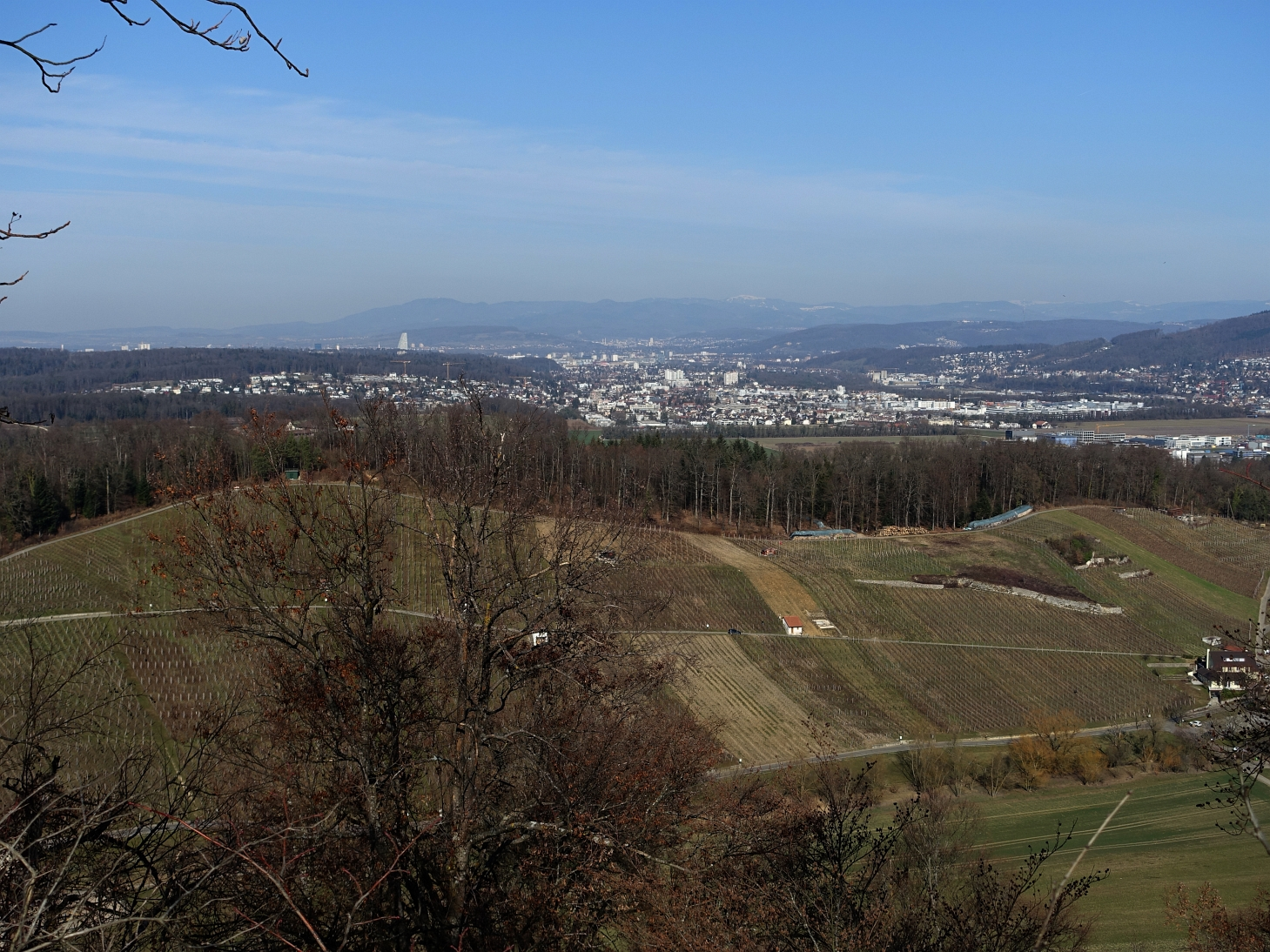 Ruine Münchsberg, Aesch, Basel Land, Schweiz